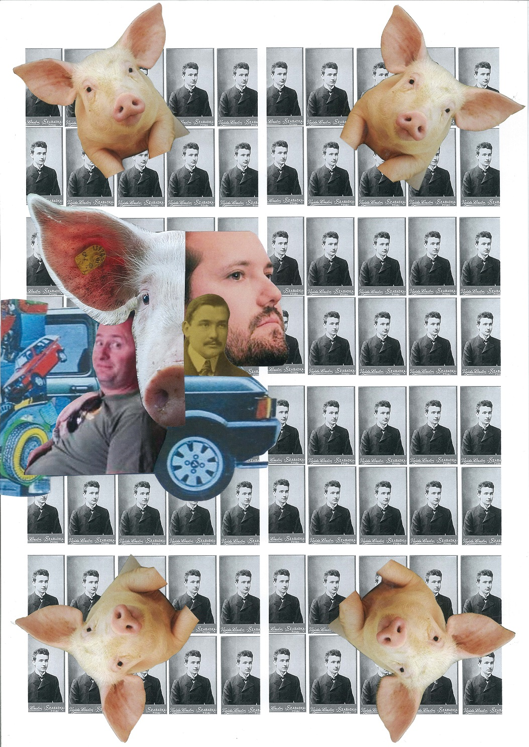 A Csáth Géza-díj vizuális arculatáért felelős Kellermann Viktória 2017-es kollázsa. 2017 collage for the Csáth Géza Literary Award by Viktória Kellermann.